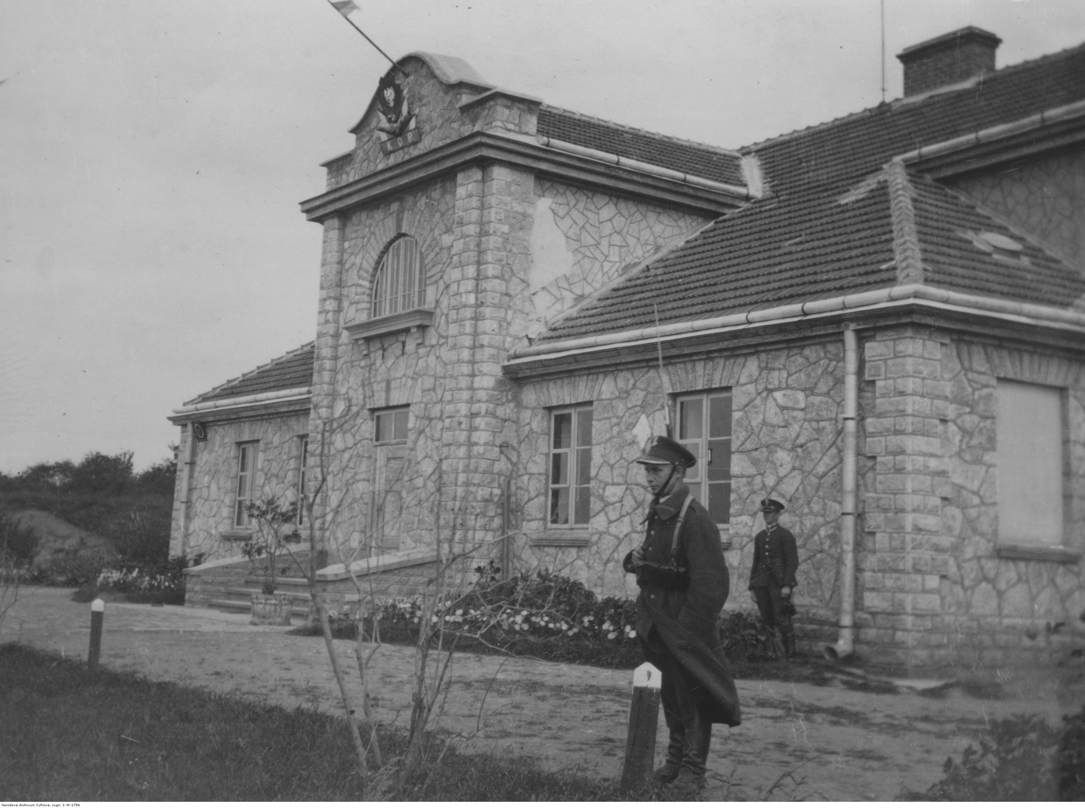 Strażnica Korpusu Ochrony Pogranicza na granicy polsko-rumuńskiej - żołnierze KOP na posterunku; 1934 r. Koncern Ilustrowany Kurier Codzienny - Archiwum Ilustracji. Sygnatura: 1-W-1756